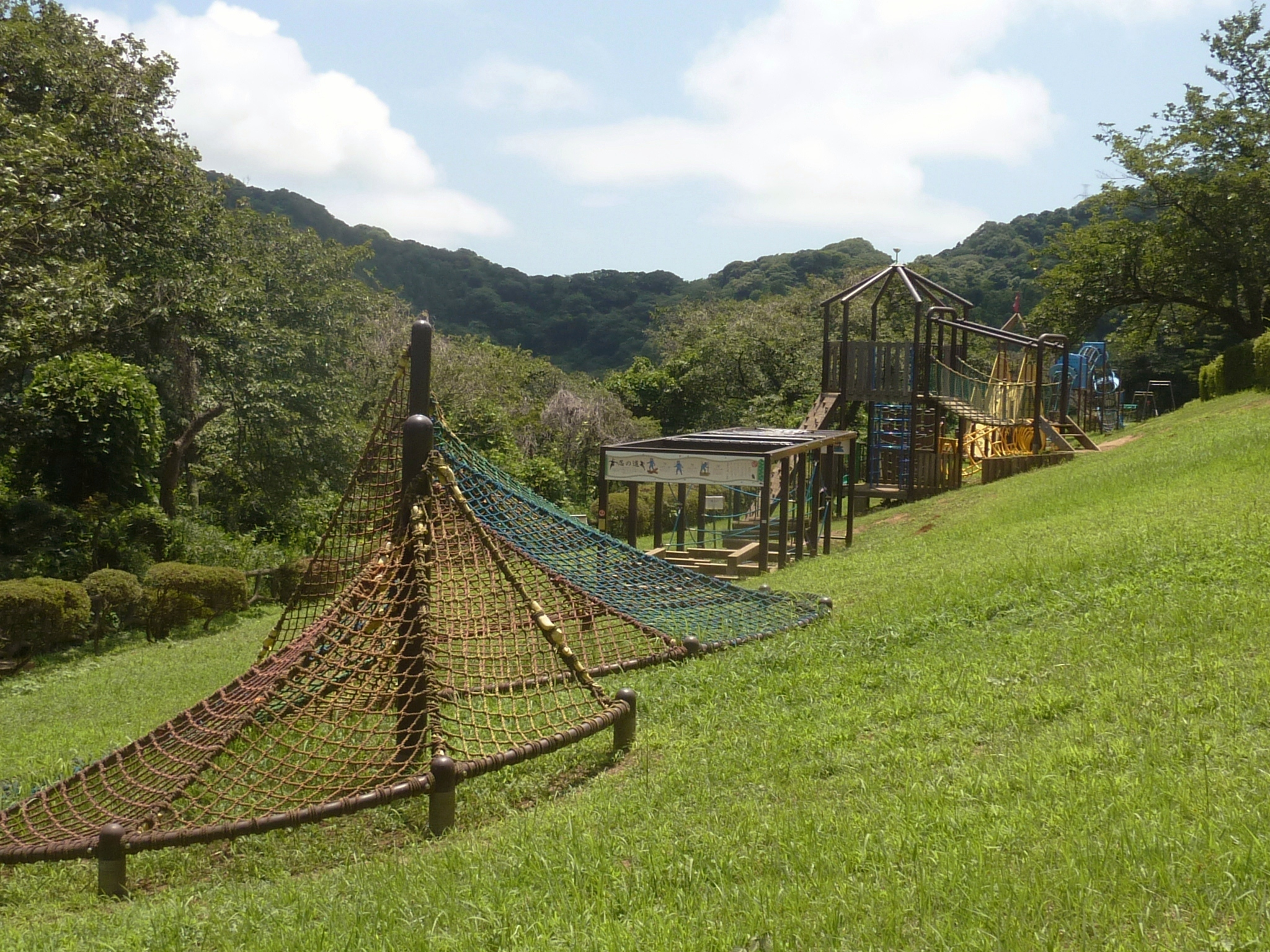 田浦梅の里のアスレチック広場（神奈川県横須賀市）